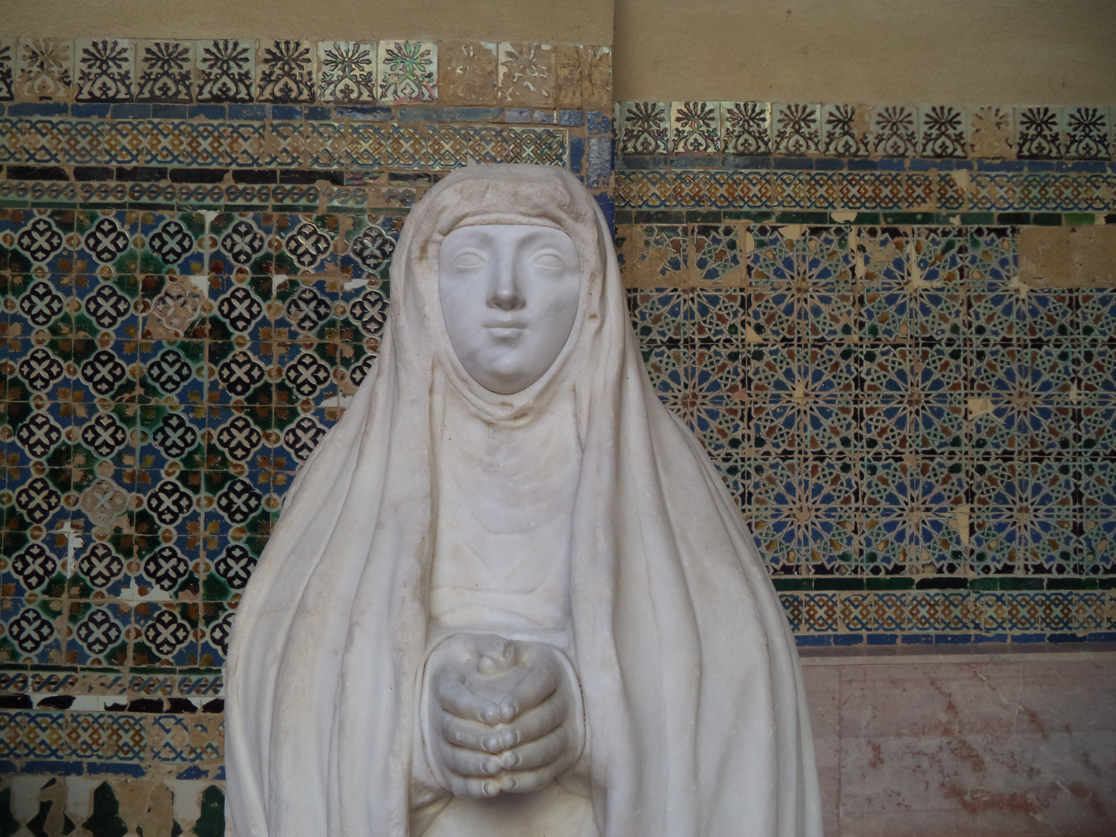 Juana de Zúñiga, esposa sevillana de Hernán Cortés. La escultura (que fue diseñada así, con la mujer orante y cubierta, para su tumba) fue encargada por duque de Alcalá a Diego de Pesquera en 1575, junto con otra estatua de Catalina Cortés. Ambas estatuas se encuentran en el monasterio de Santa María de las Cuevas, también conocido como la Cartuja de Sevilla.